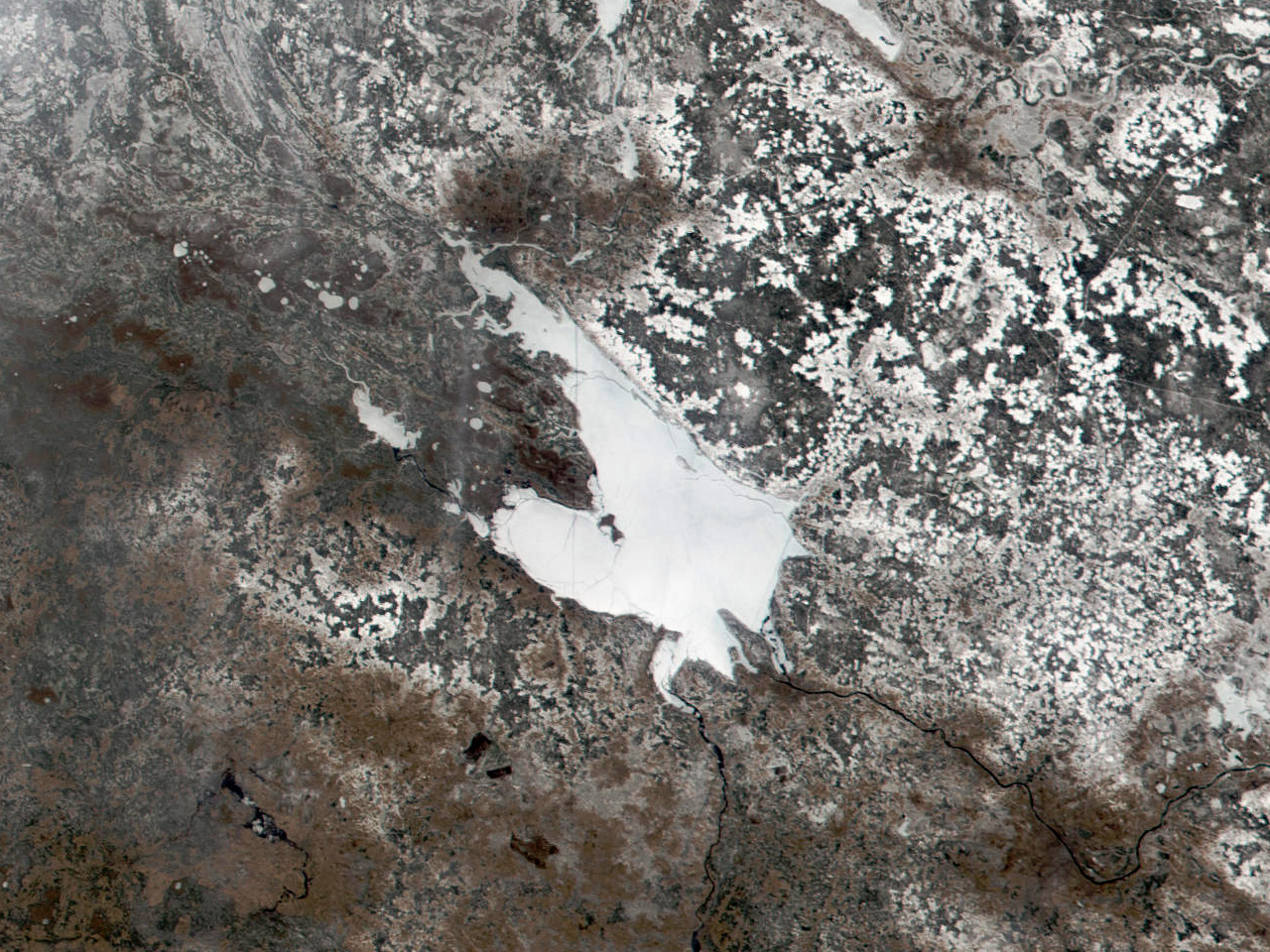 Satellitenbild des Rybinsker Stausee